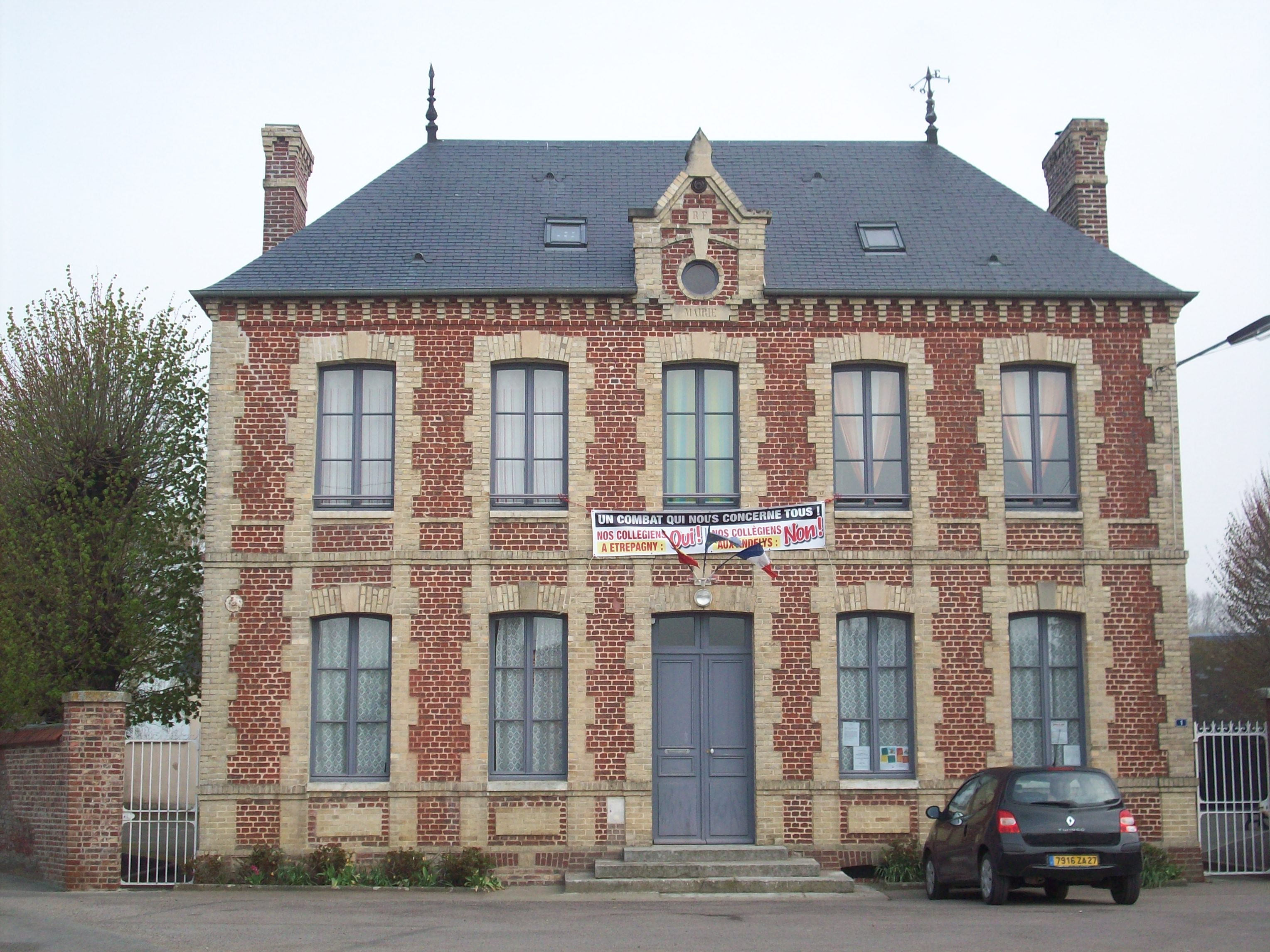 Mairie de Nojeon-en-Vexin.